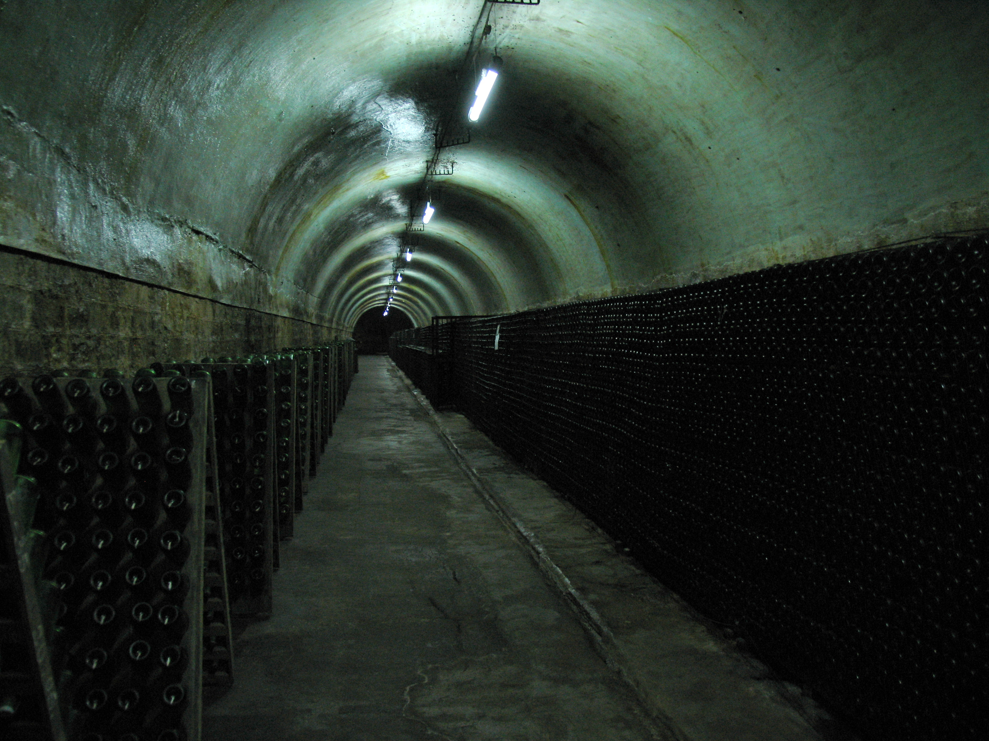 Погреб завода "Абрау-Дюрсо".